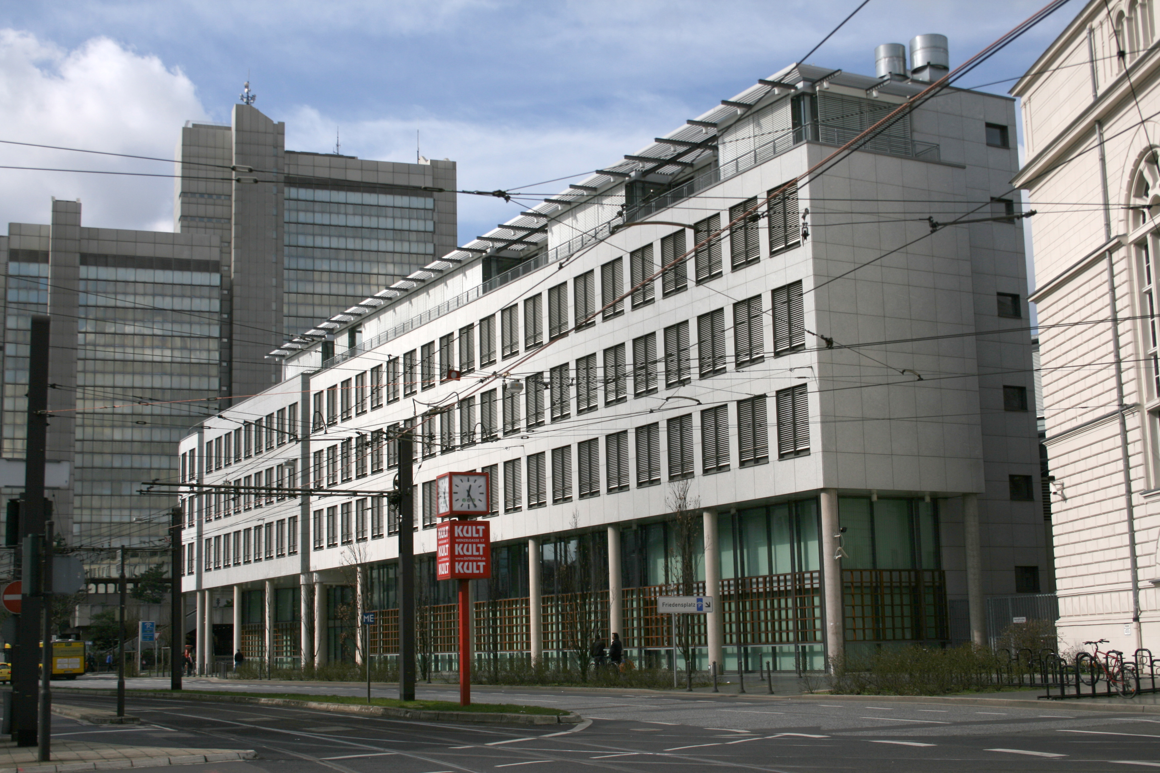 Landgericht Bonn: Gebäudeteil an der Oxfordstraße; hinten links das Stadthaus